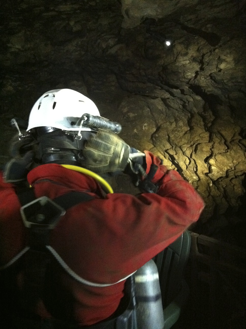 Vorbereitung auf einen Tauchgang im "Stillen See" der Kluterthöhle, Ennepetal.